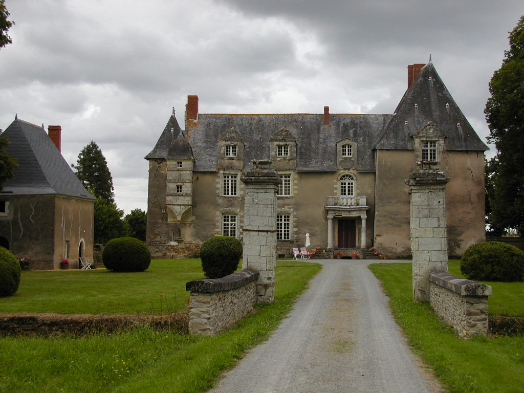 façade Ouest, ensemble architectural des 16e et 17e siècle